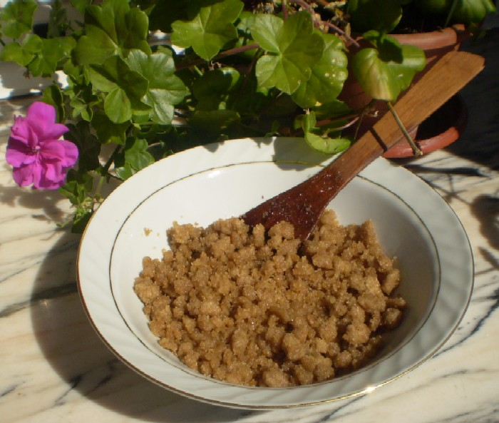 panchón